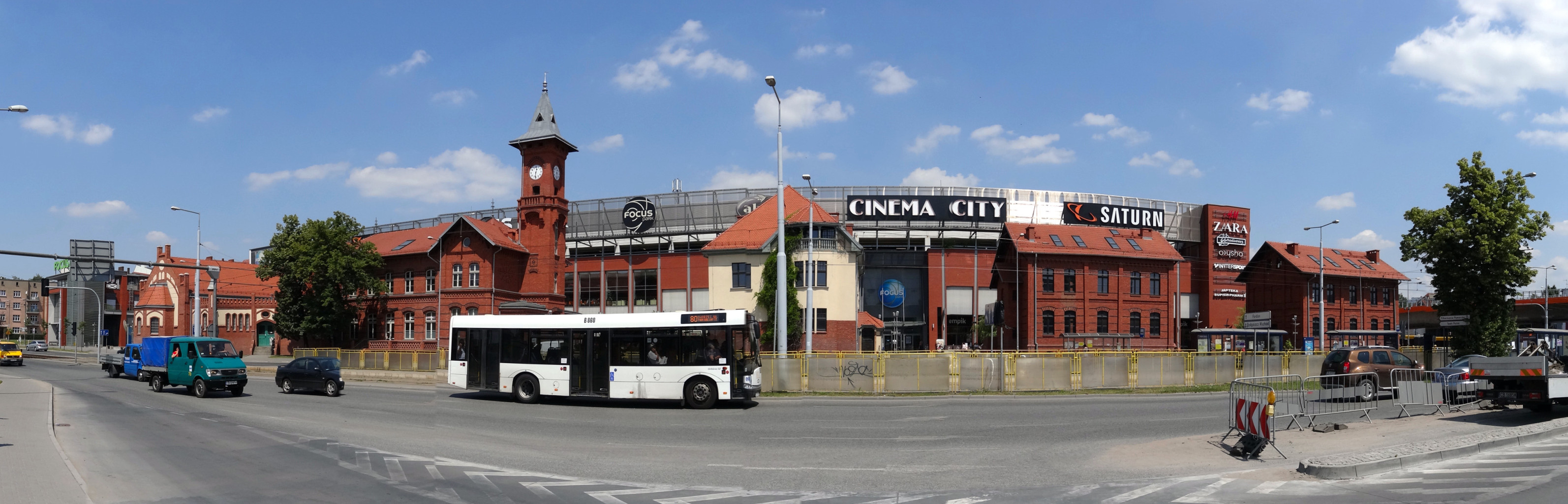 Centrum handlowe Focus Mall w Bydgoszczy przy ul. Jagiellońskiej